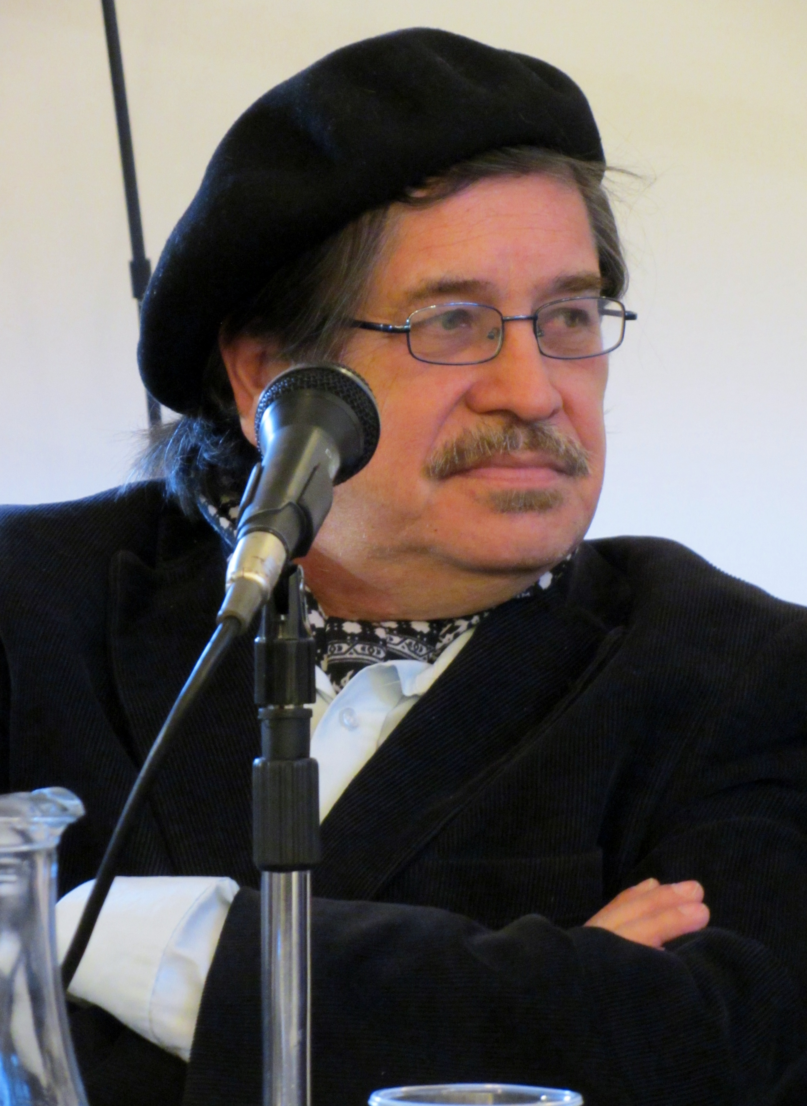 El escritor chileno-sueco Omar Pérez en la Feria Internacional del Libro de Santiago 2015